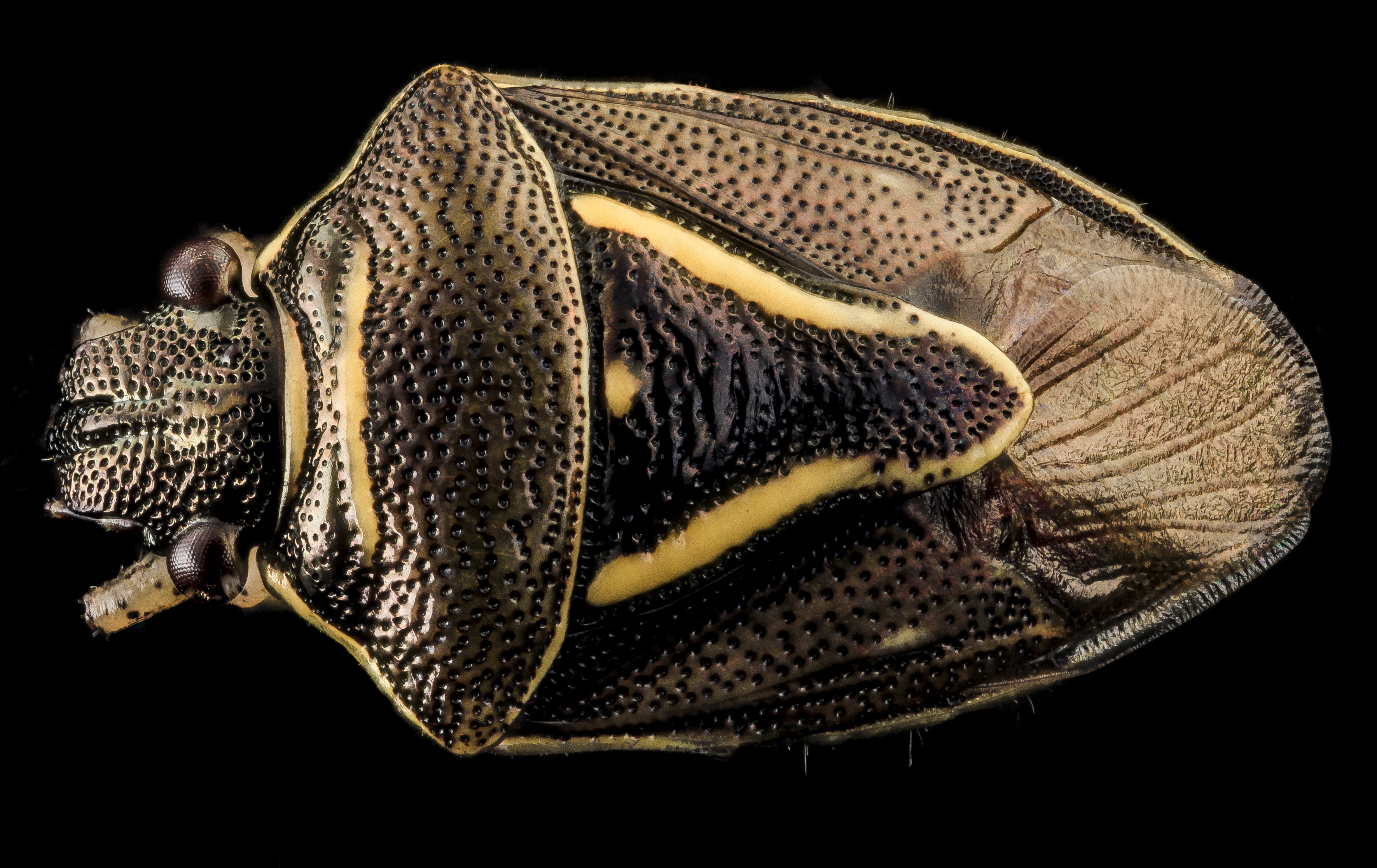 Mormidea lugens, Beltsville, md, a lovely small stink bug